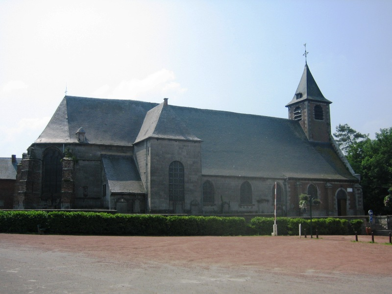 Eglise Saint-Gery, Marche-lez-Ecaussinnes